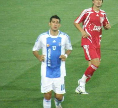 la meciul de prezentare cu international curtea de arges 2009